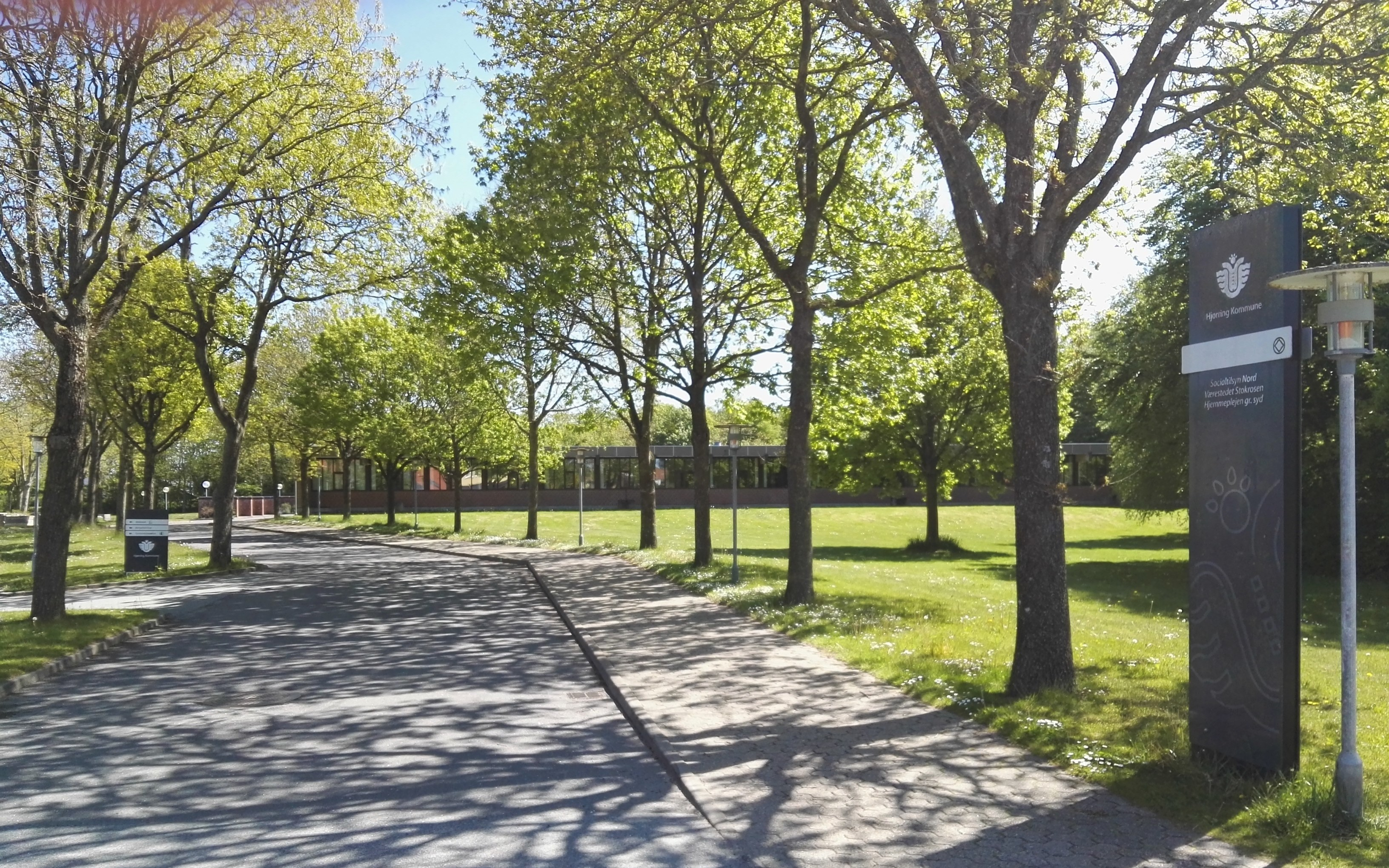 Den tidligere Løkken-Vrå Kommunes rådhus på Sønder Vråvej 5 i Vrå, nu en administrationsbygning for Hjørring Kommune